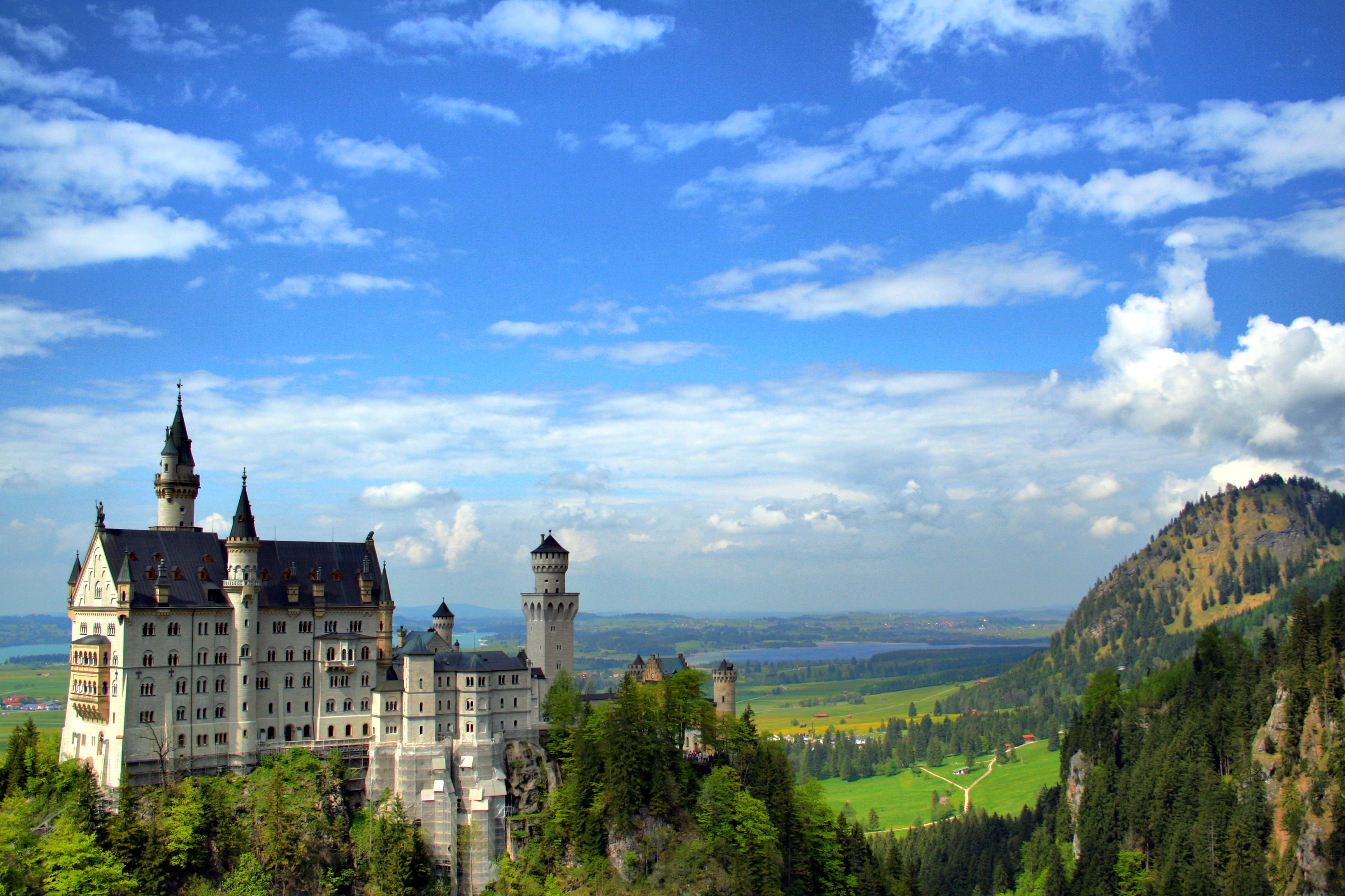 Neuschwanstein Castle